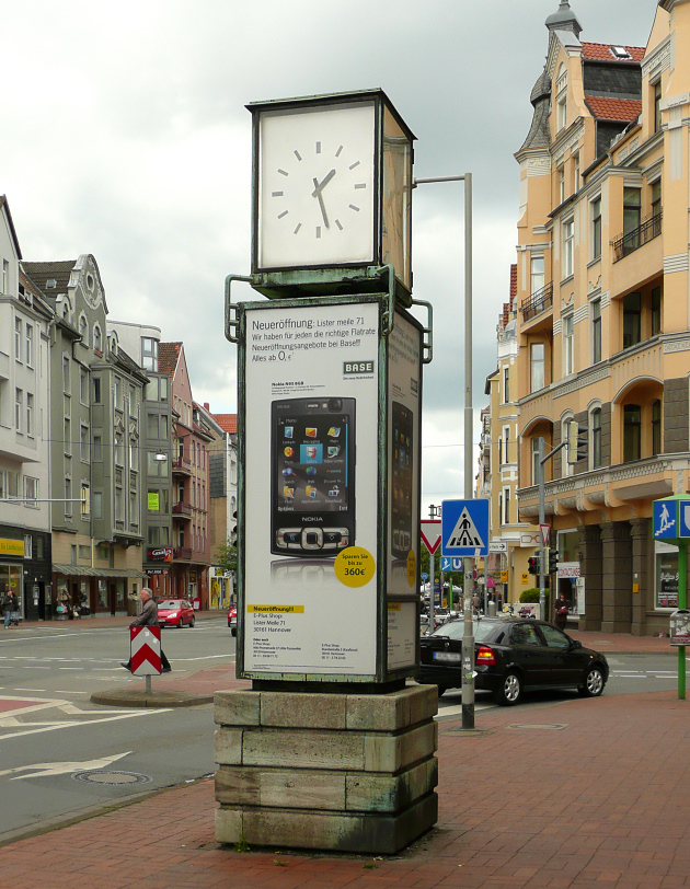 Eine der zehn erhaltenen „Falke-Uhren“, die Adolf Falke 1926 als futuristischen Typenentwurf in einem Architektenwettbewerb ablieferte; hier mit Blick von der Bödekerstraße über den Lister Platz zur Ferdinand-Wallbrecht-Straße, List, Hannover.